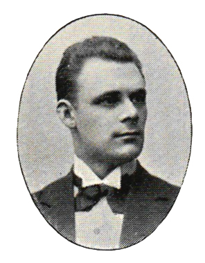 Skådespelaren Erland Wagner